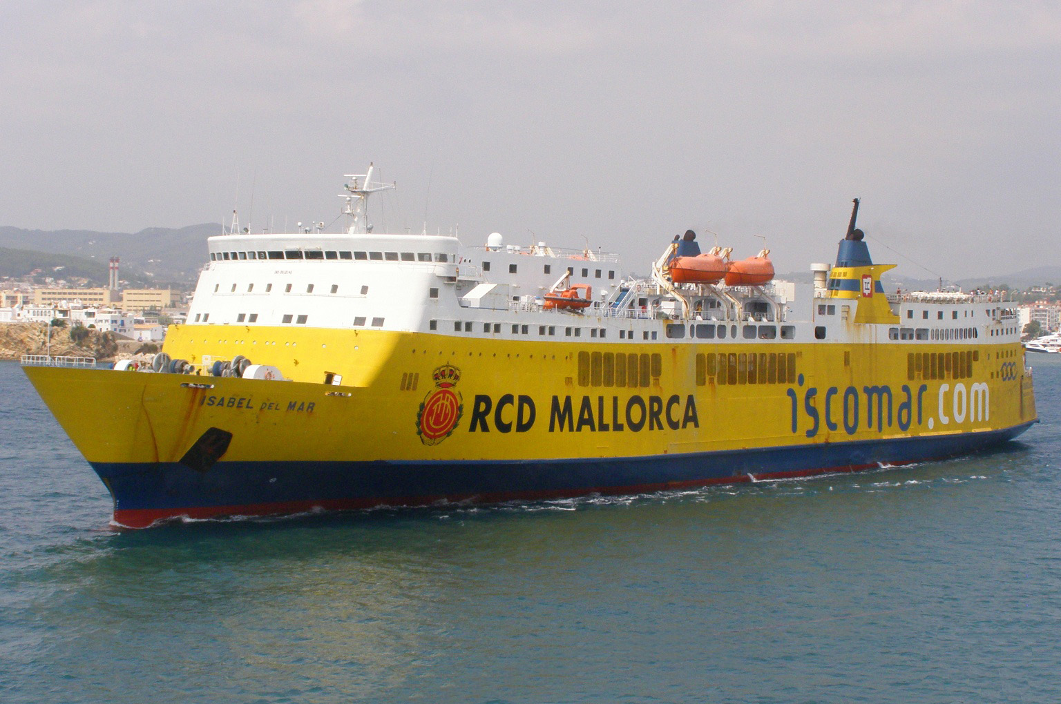 ISCOMAR ferry 'Isabel del Mar'